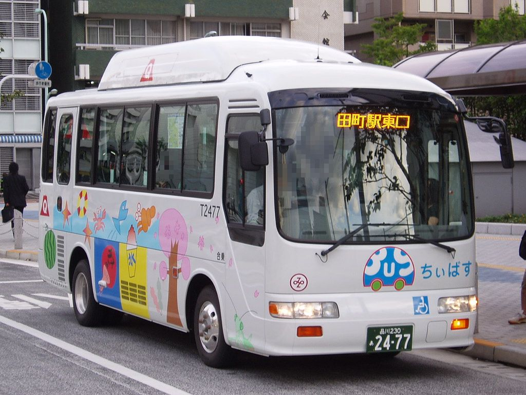 Fujikyu T2477 "Chi-Bus" Hino PB-RX6JFAA